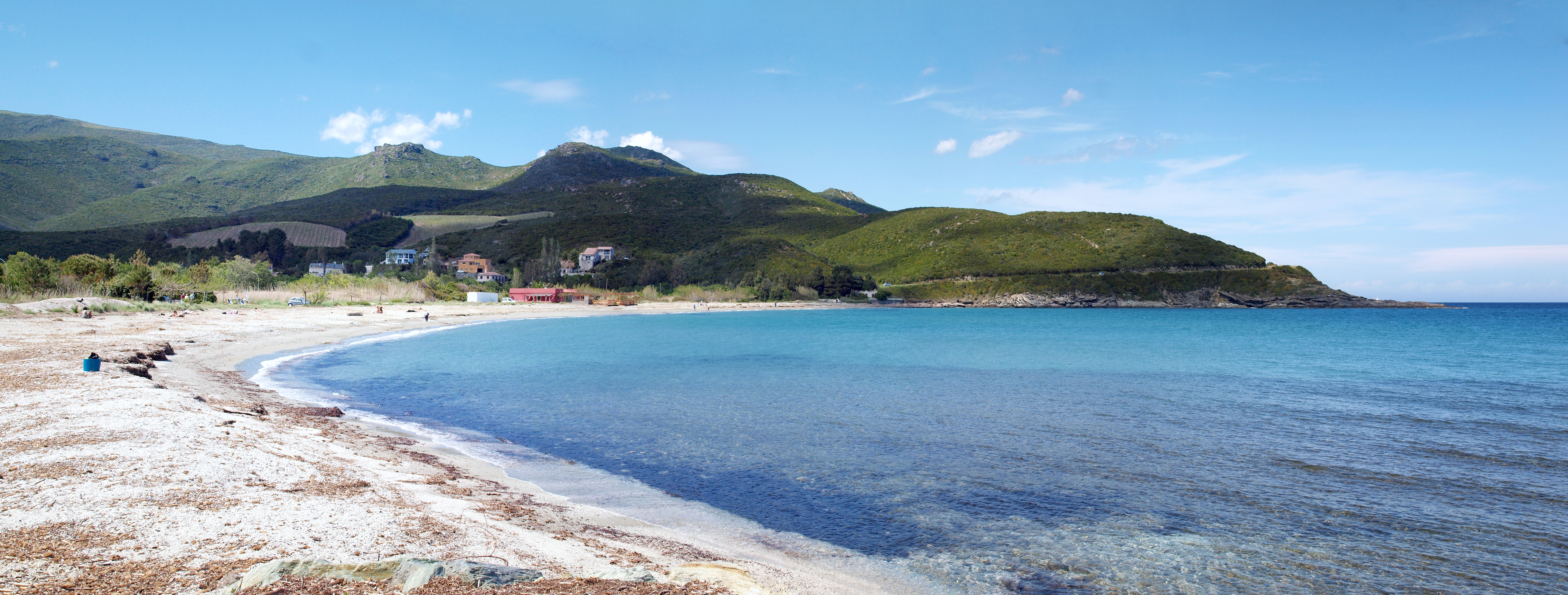 Pietracorbara, Cap Corse (Corse) - Panorama de la plage